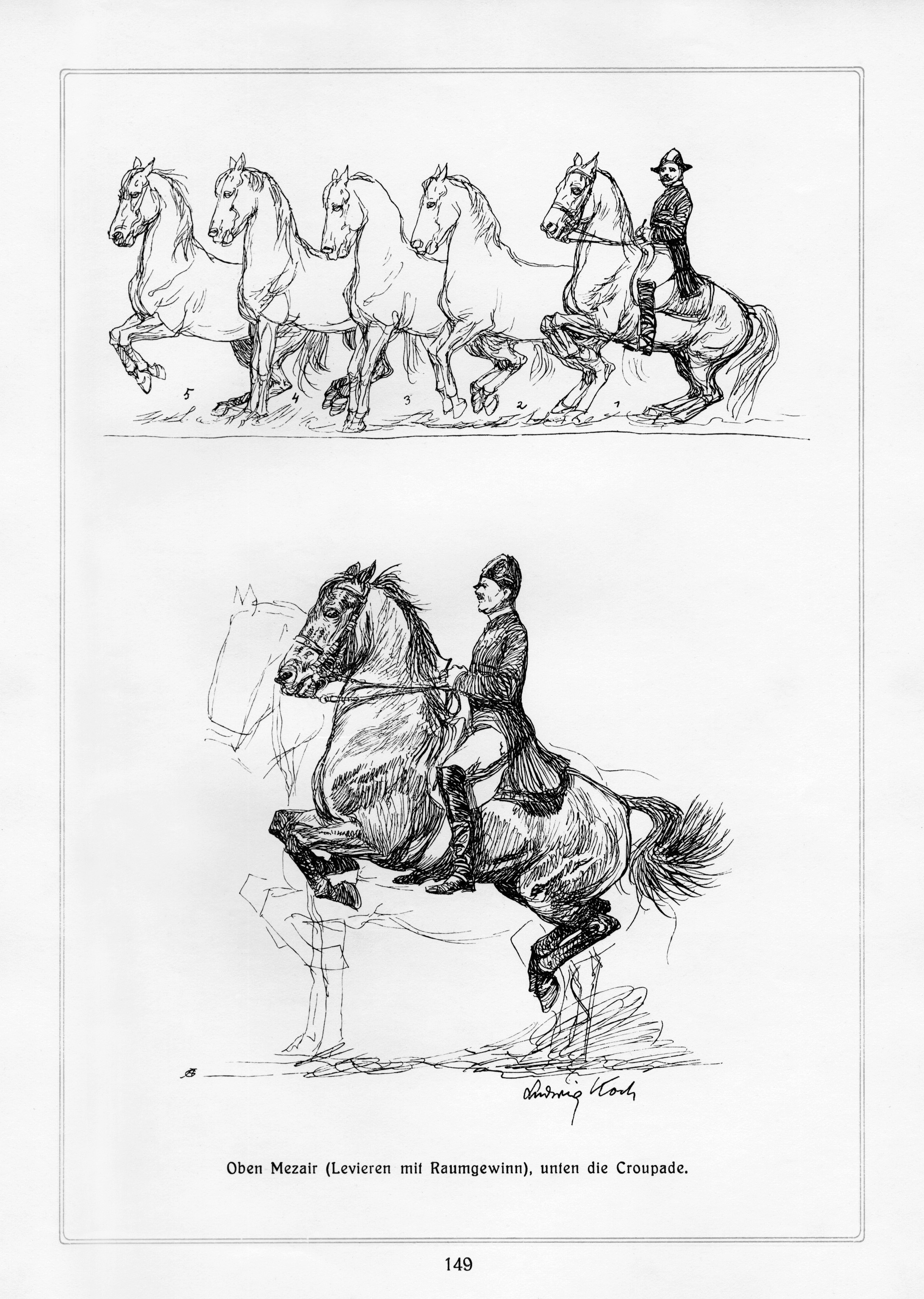 Titel "Die Croupade"